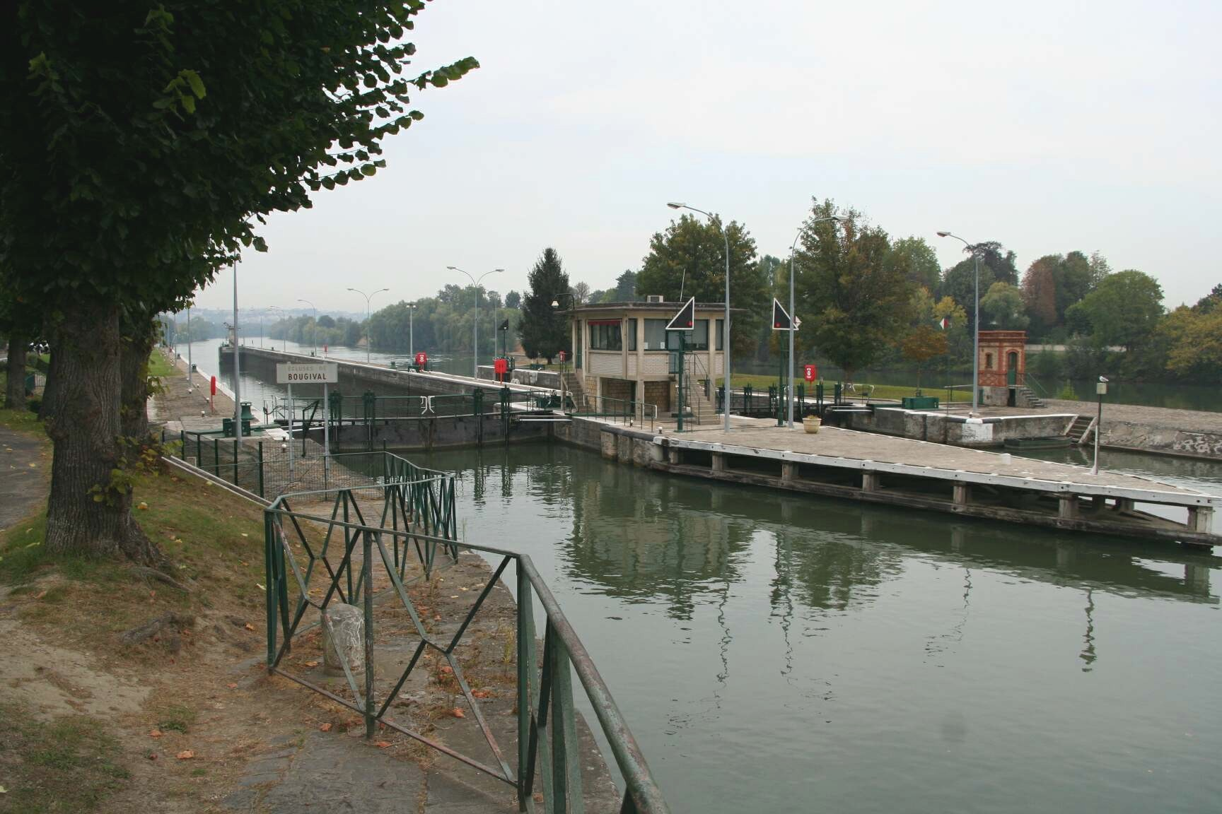 Écluses de Bougival et pointe de l'Île de la Loge, Yvelines (France)